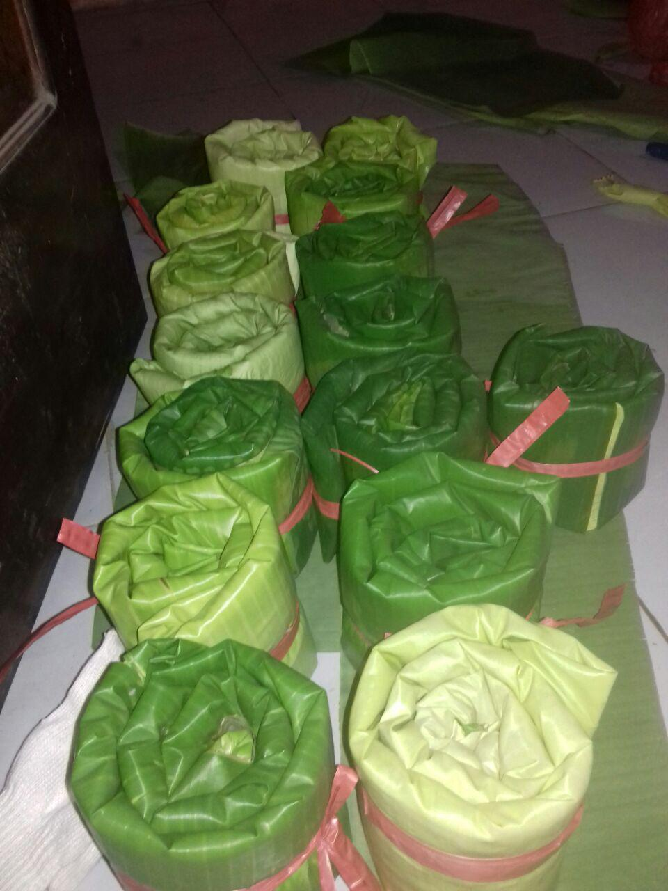 Tabheg. Foto diambil saat pemecahan rekor MURI "Makan nasi tabheg terbanyak" pada 22 Oktober 2017